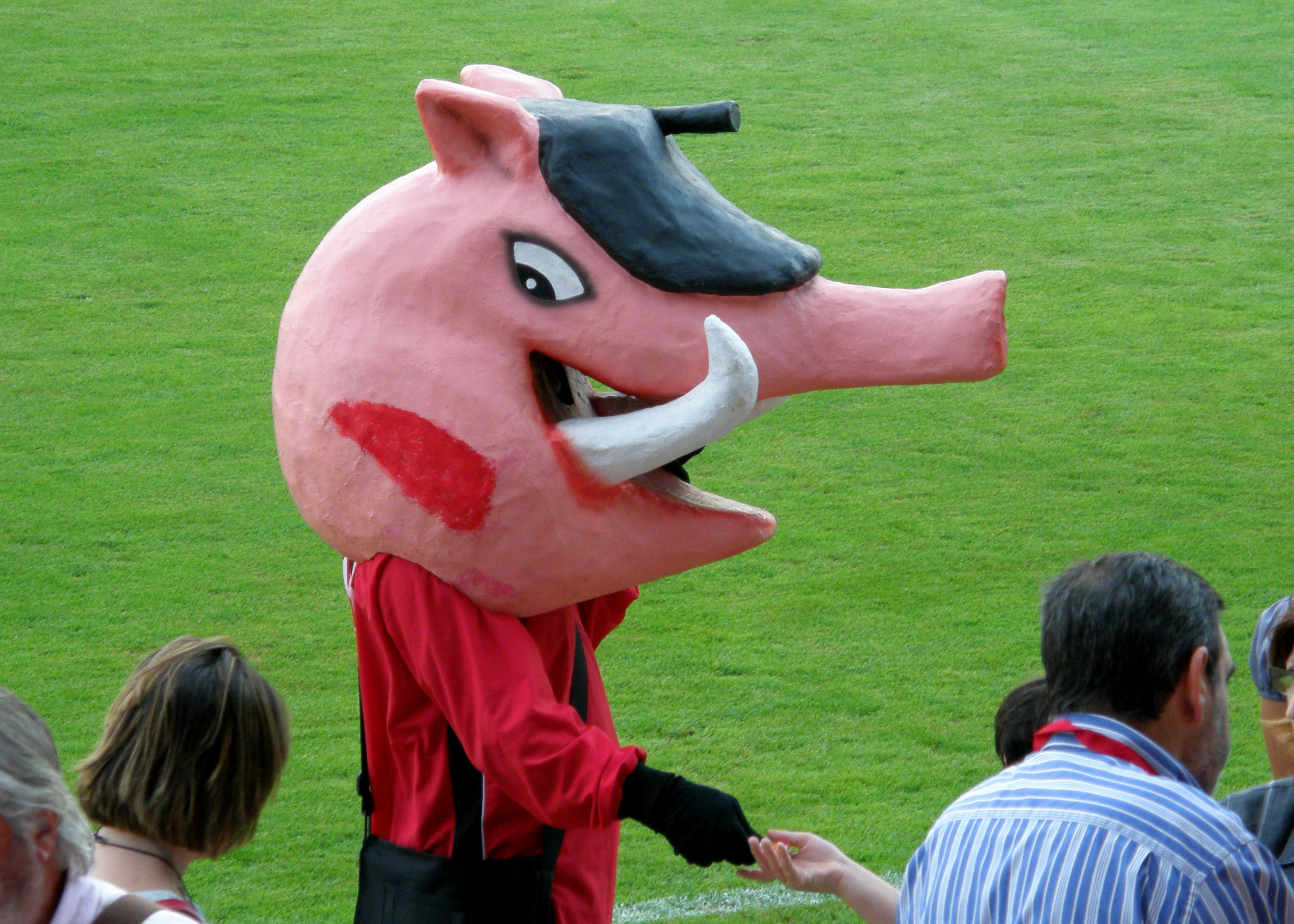 "El jabato", mascota del Club Deportivo Mirandés en el encuentro Mirandés - Numancia.